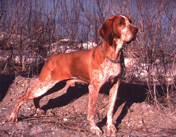 Bracco Italiano Roano Marrone